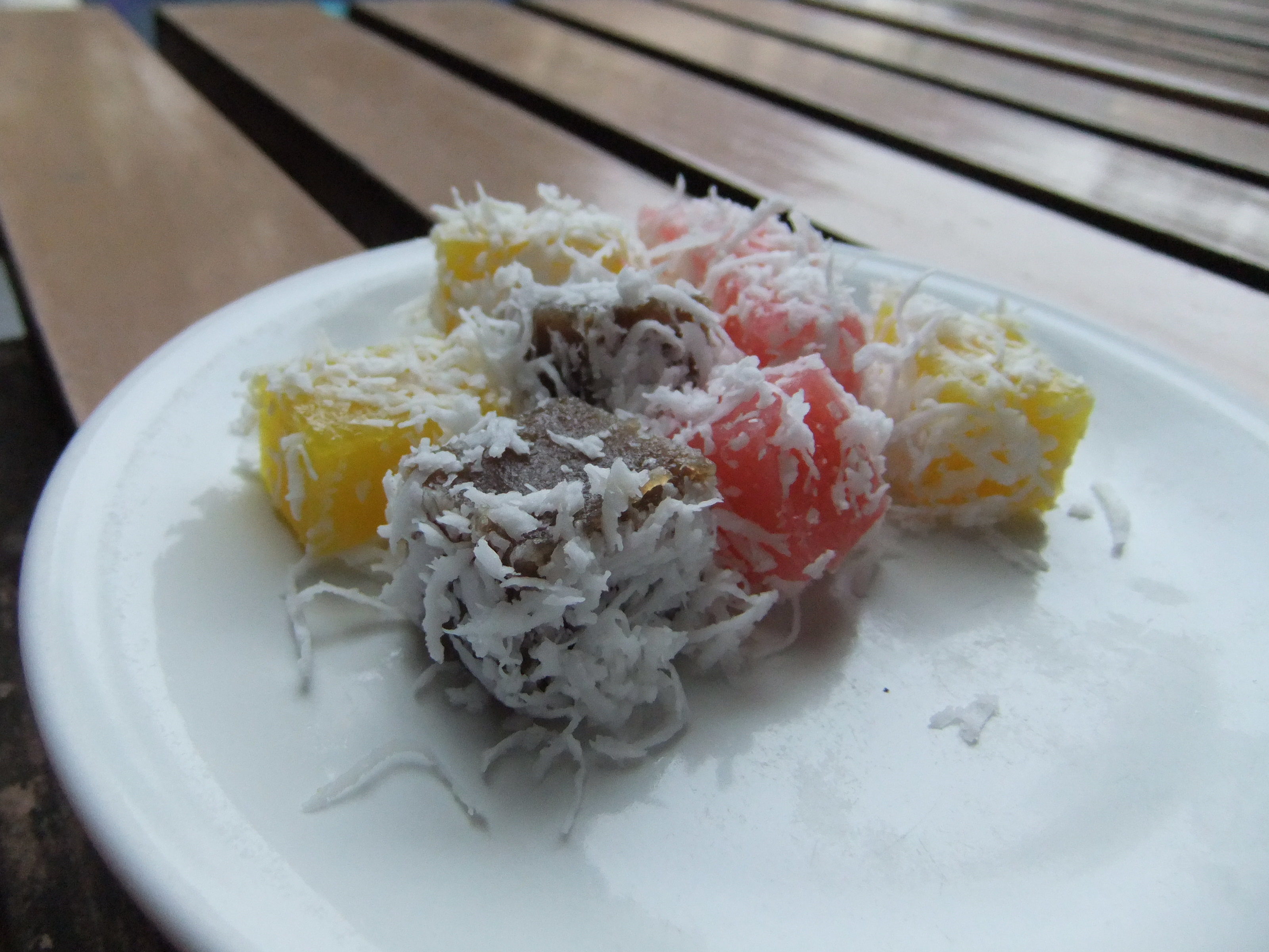 Cenil